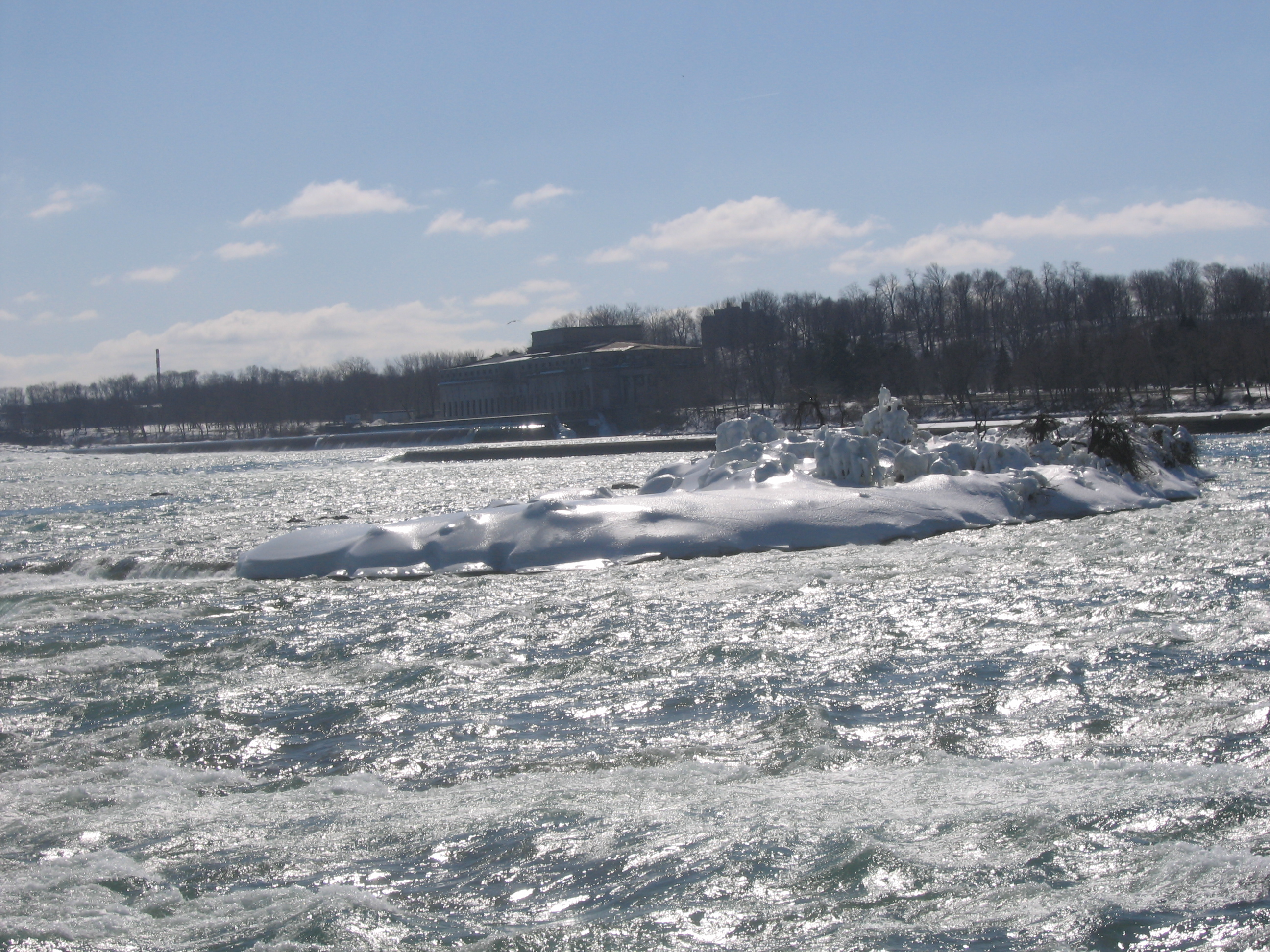 Self-Made